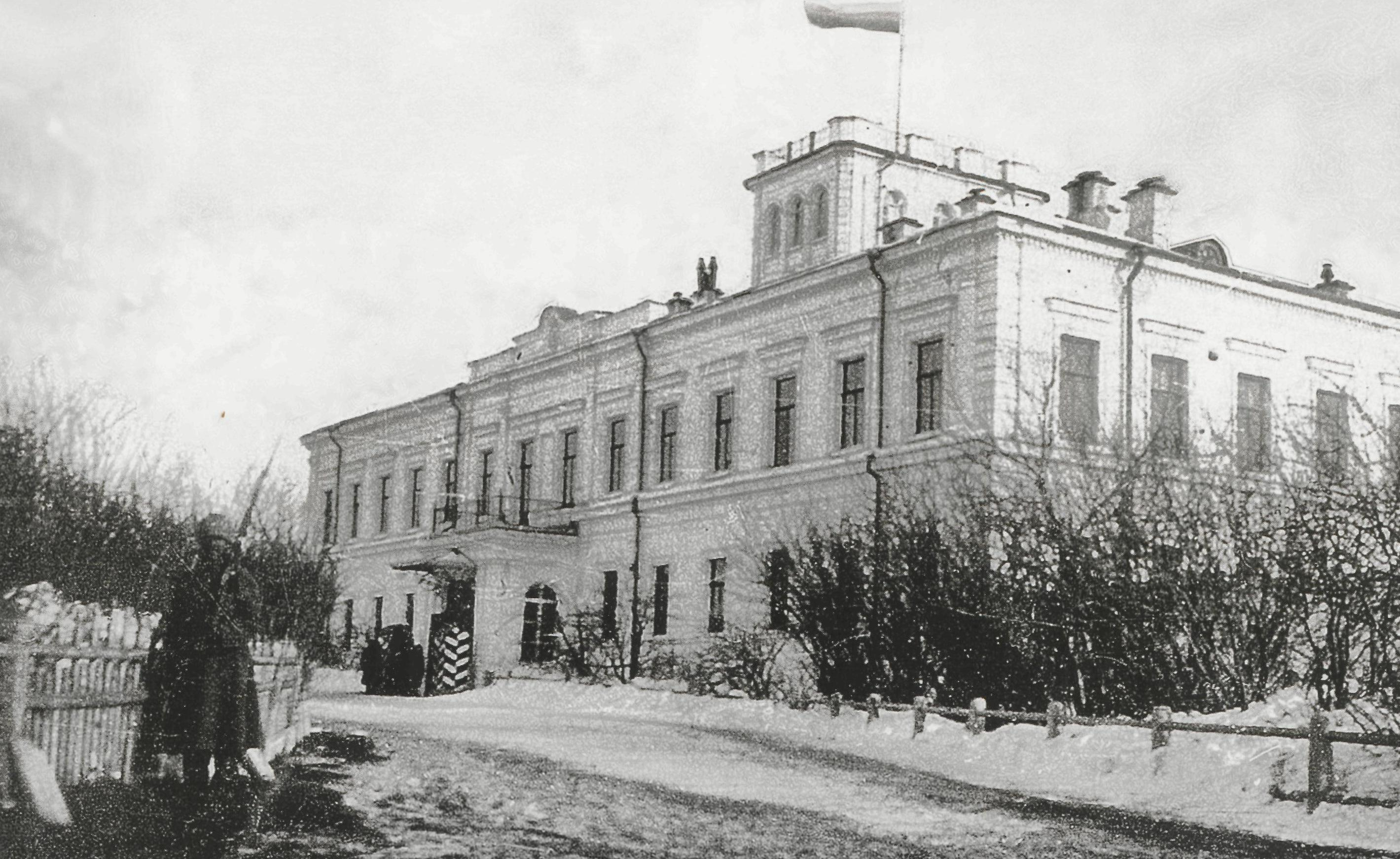 Дворец Российского (Омского) правительства Колчака